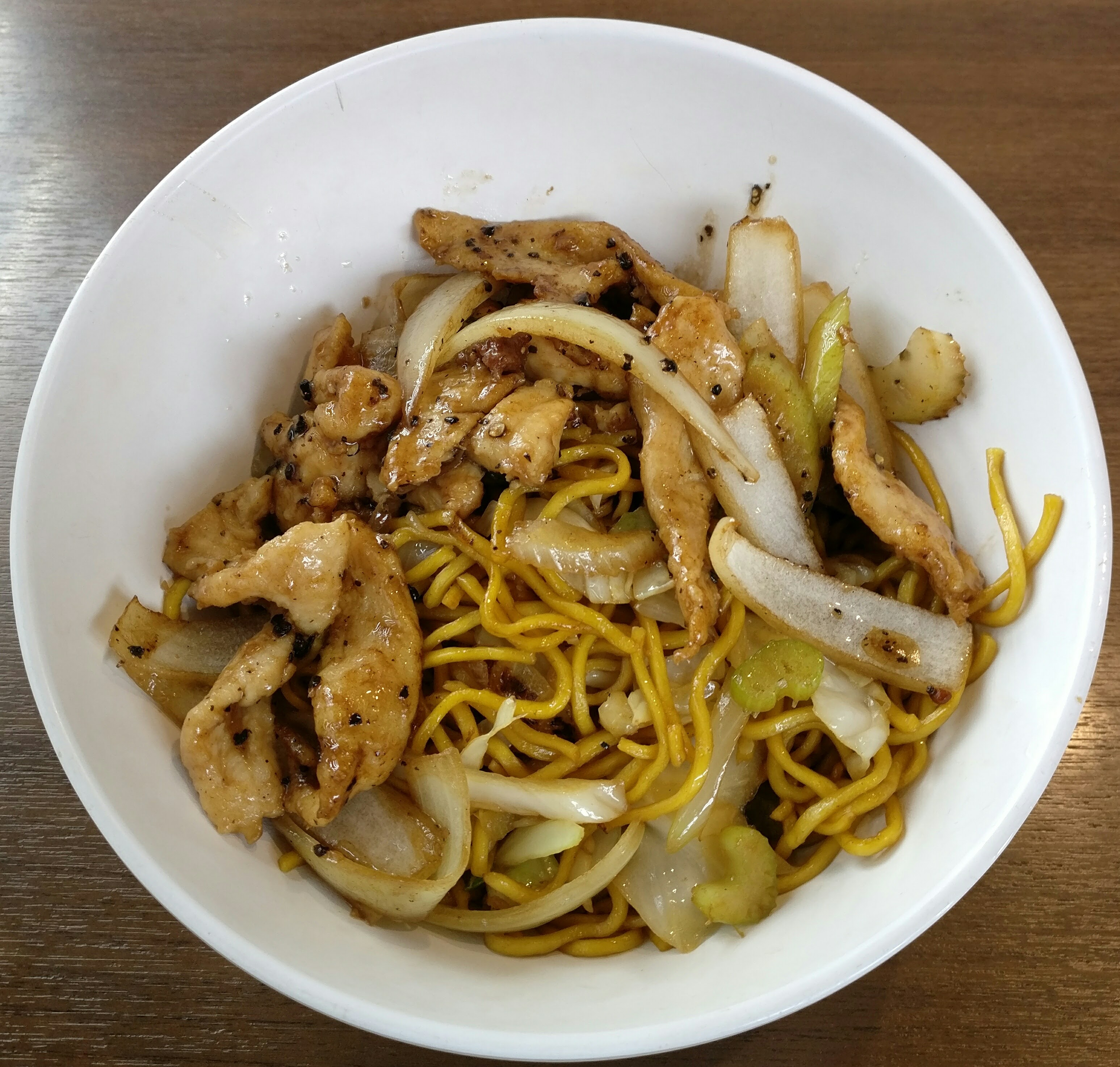 ചിക്കൻ ചേർത്ത നൂഡിൽസ്, ഒരു ചൈനീസ് വിഭവം